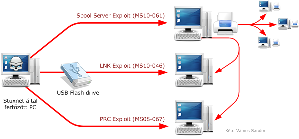 A Stuxnet terjedési mechanizmusa, 0-day Windows exploit-ok segítségével